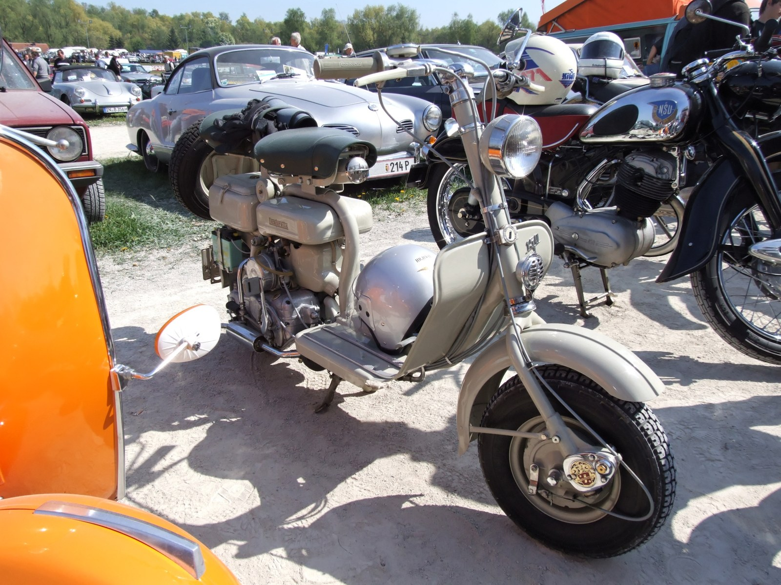 Quelle: selbst fotografiert, 04/2007 Fotograf: Späth Chr.